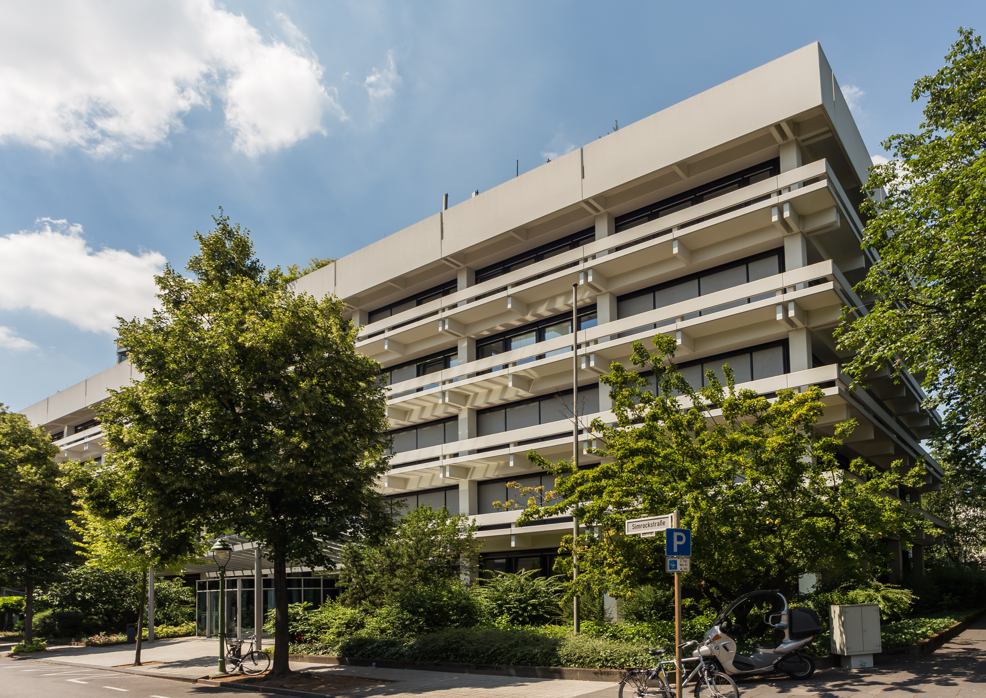 Gebäude des Deutschen Sparkassen- und Giroverbands in Bonn-Gronau, Simrockstraße 4, Architekt Ernst van Dorp (1970): Ansicht aus der Simrockstraße Ecke Buschstraße